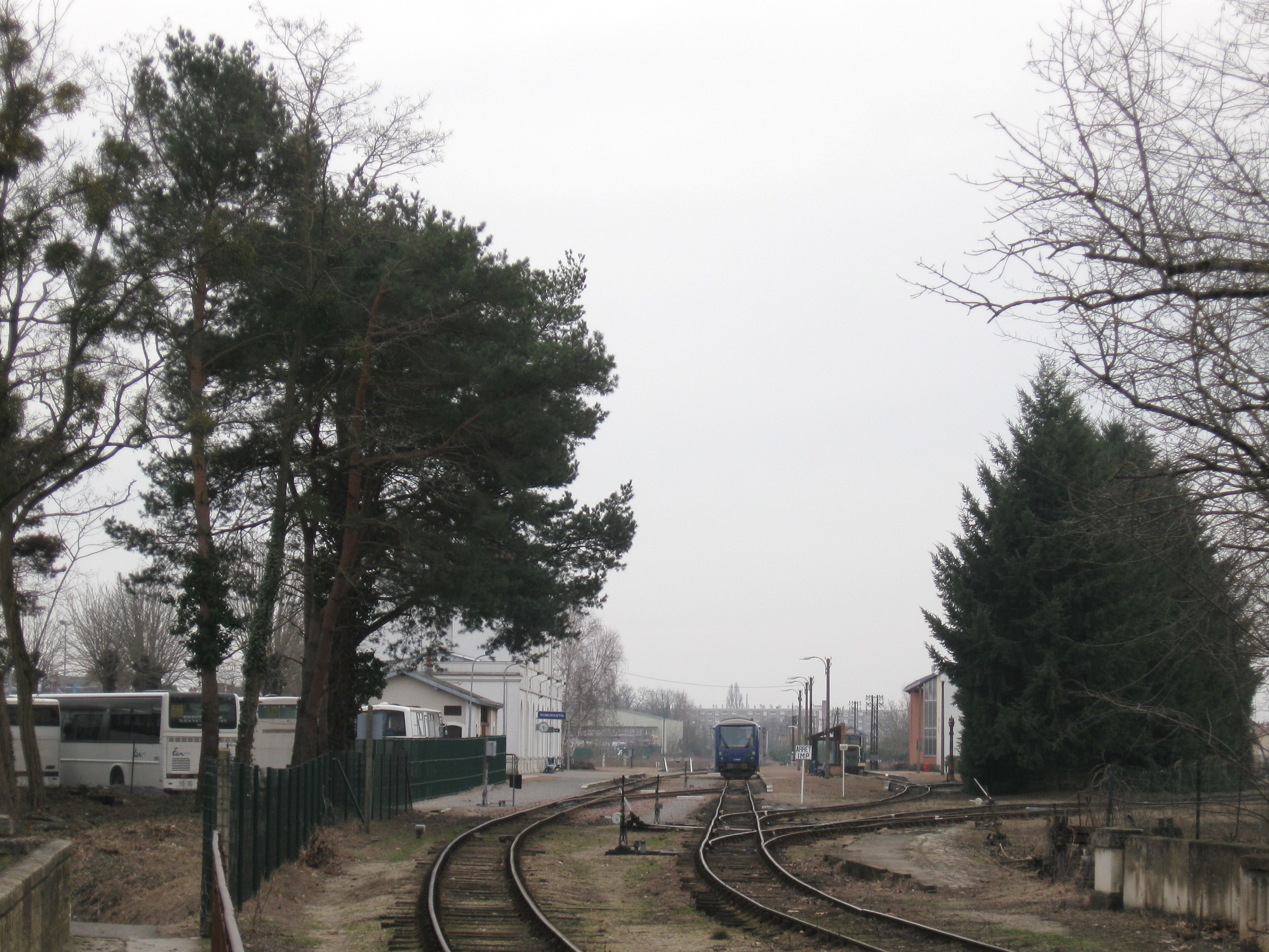 Gare de Romorantin-Blanc-Argent, Romorantin-Lanthenay, Loir-et-Cher, France